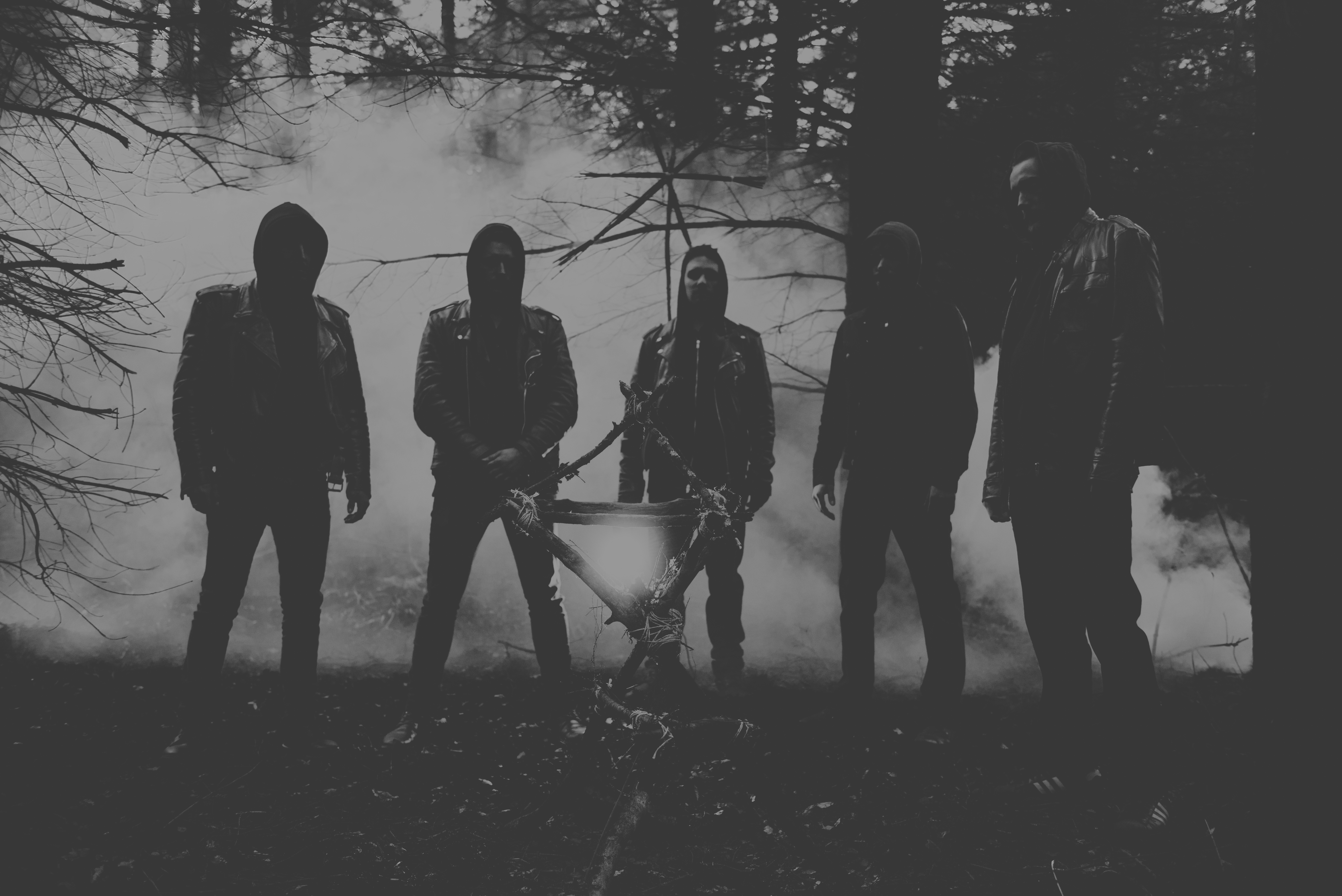 Wheelfall, promo shoot Glasrew Point